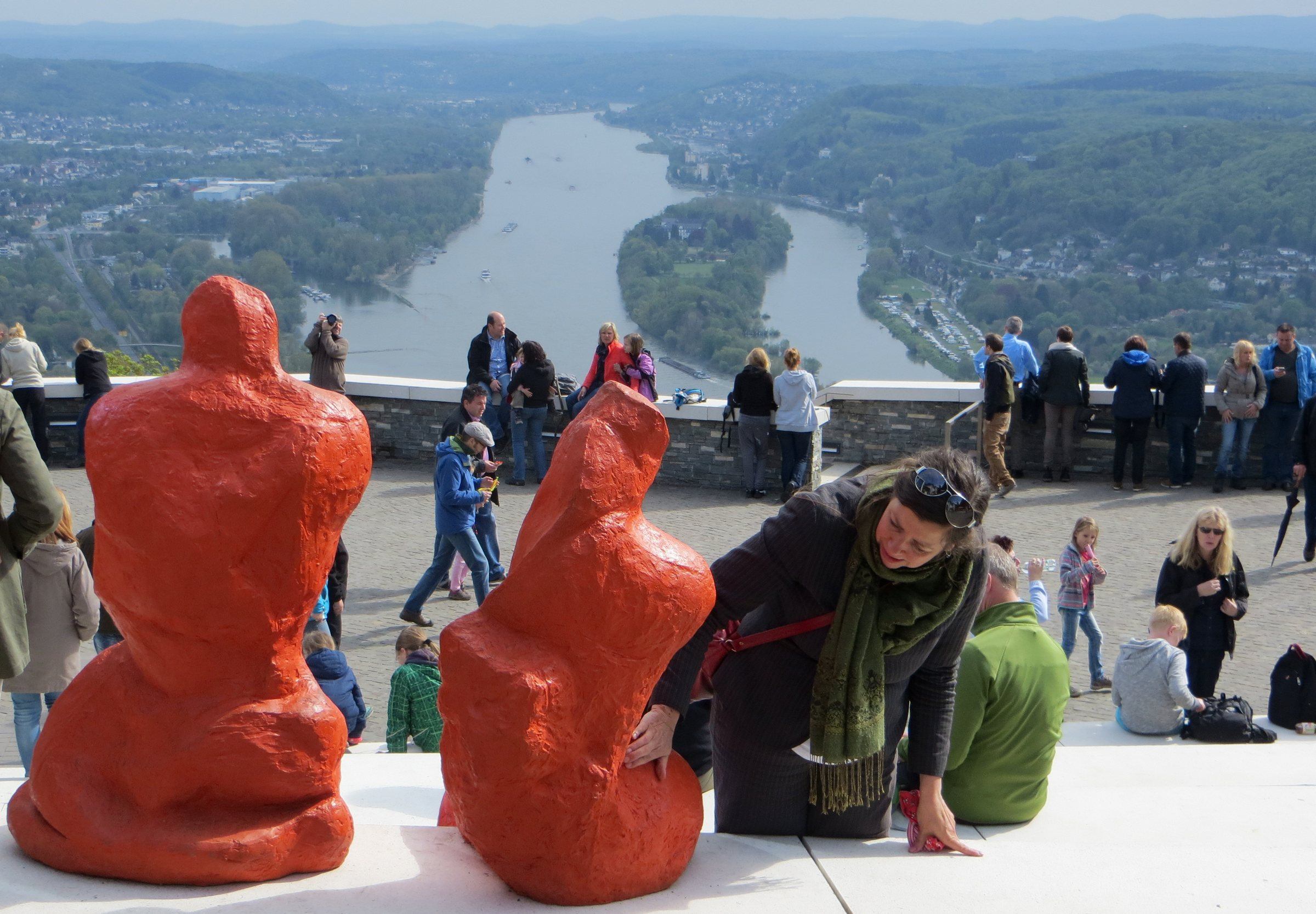 Two Forms, Skulptur mit Künstlerin Bettina Meyer am Drachenfels vor Rheinpanorama, Königswinter.